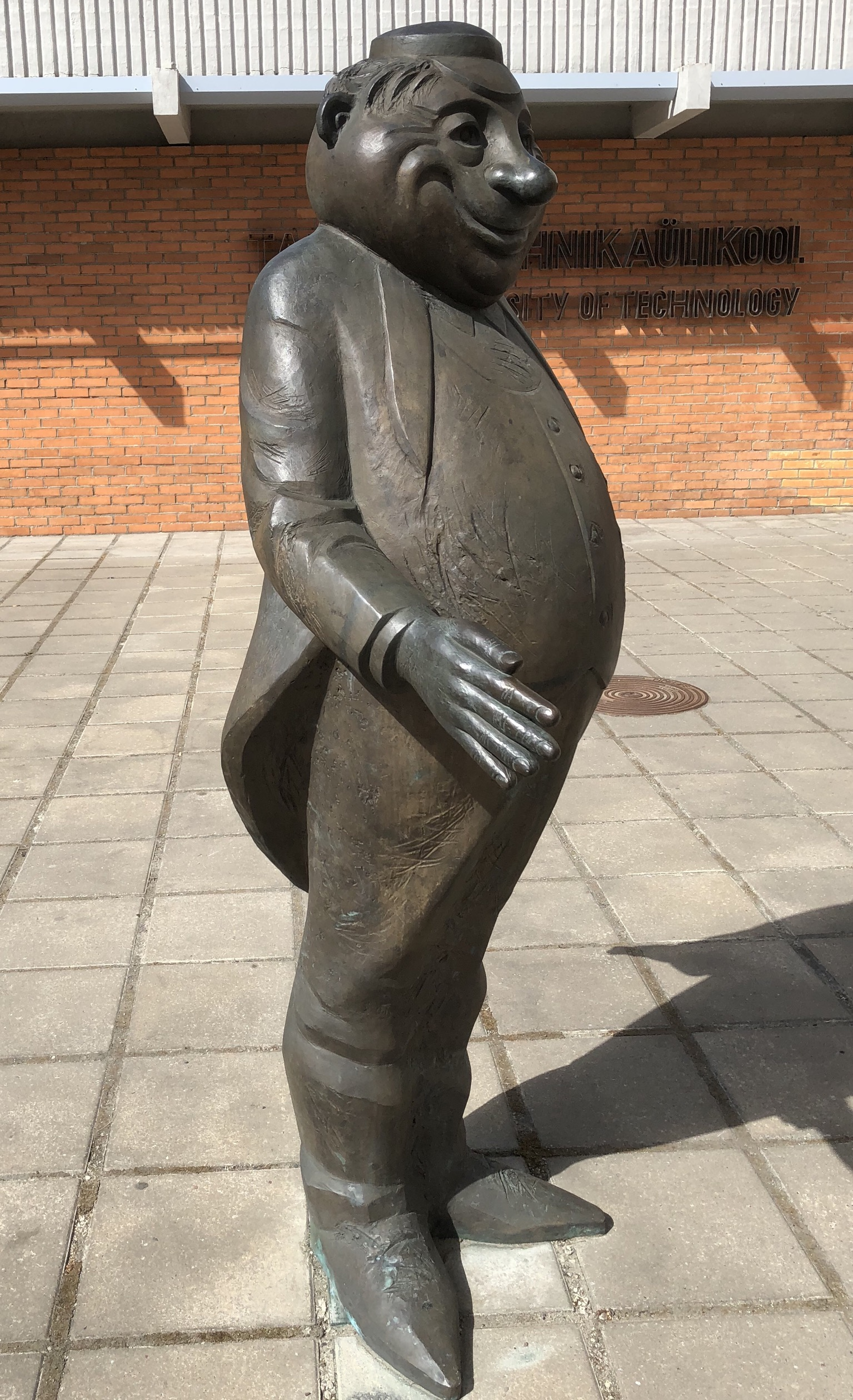 Figur vor der Technischen Universität in Tallinn